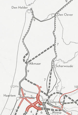 Behoort bij de Instelling van een Rijkswegenfonds (Wet op het Rijkswegenfonds)